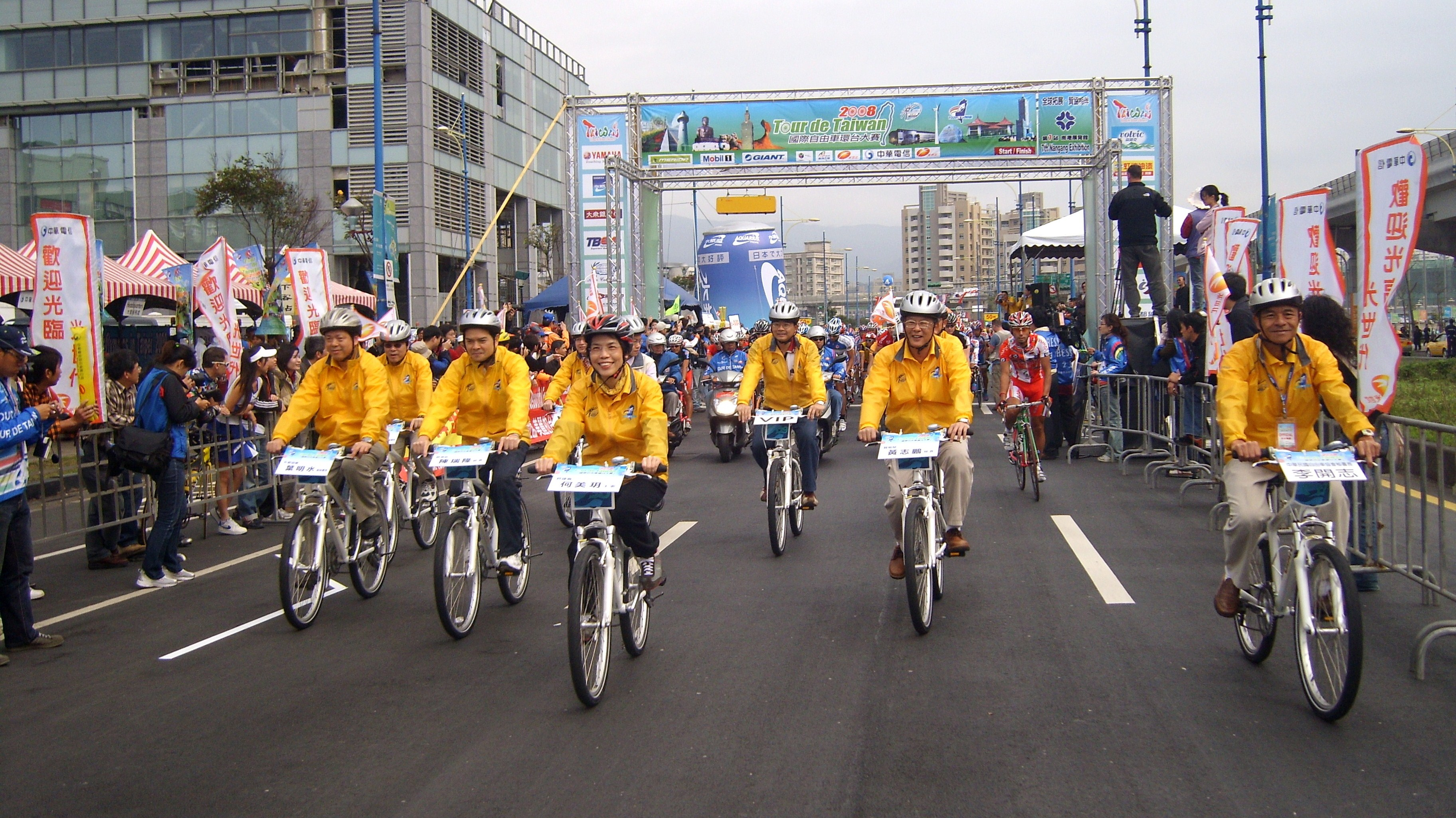 2008 Tour de Taiwan TWTC Nangang Stage: Lead-riding.